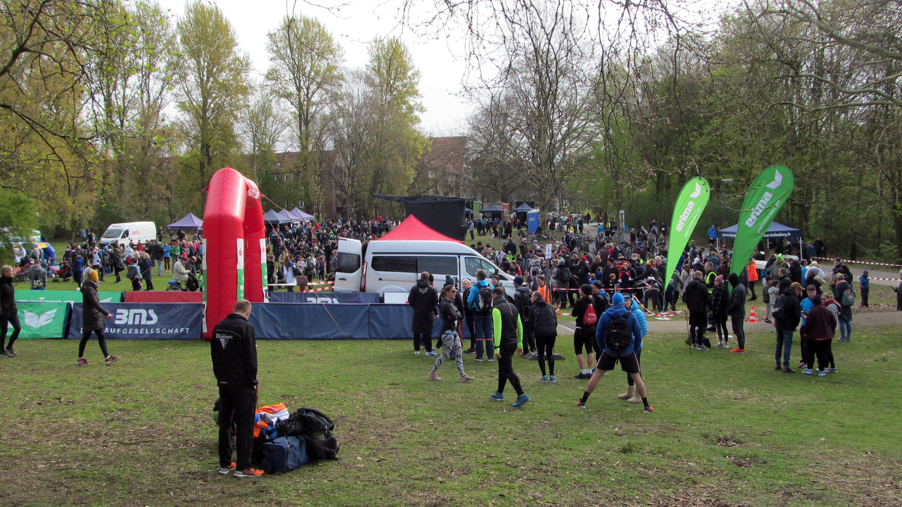 "Hammer Lauf", Volkssportveranstaltung im Thörls-Park in Hamburg-Hamm